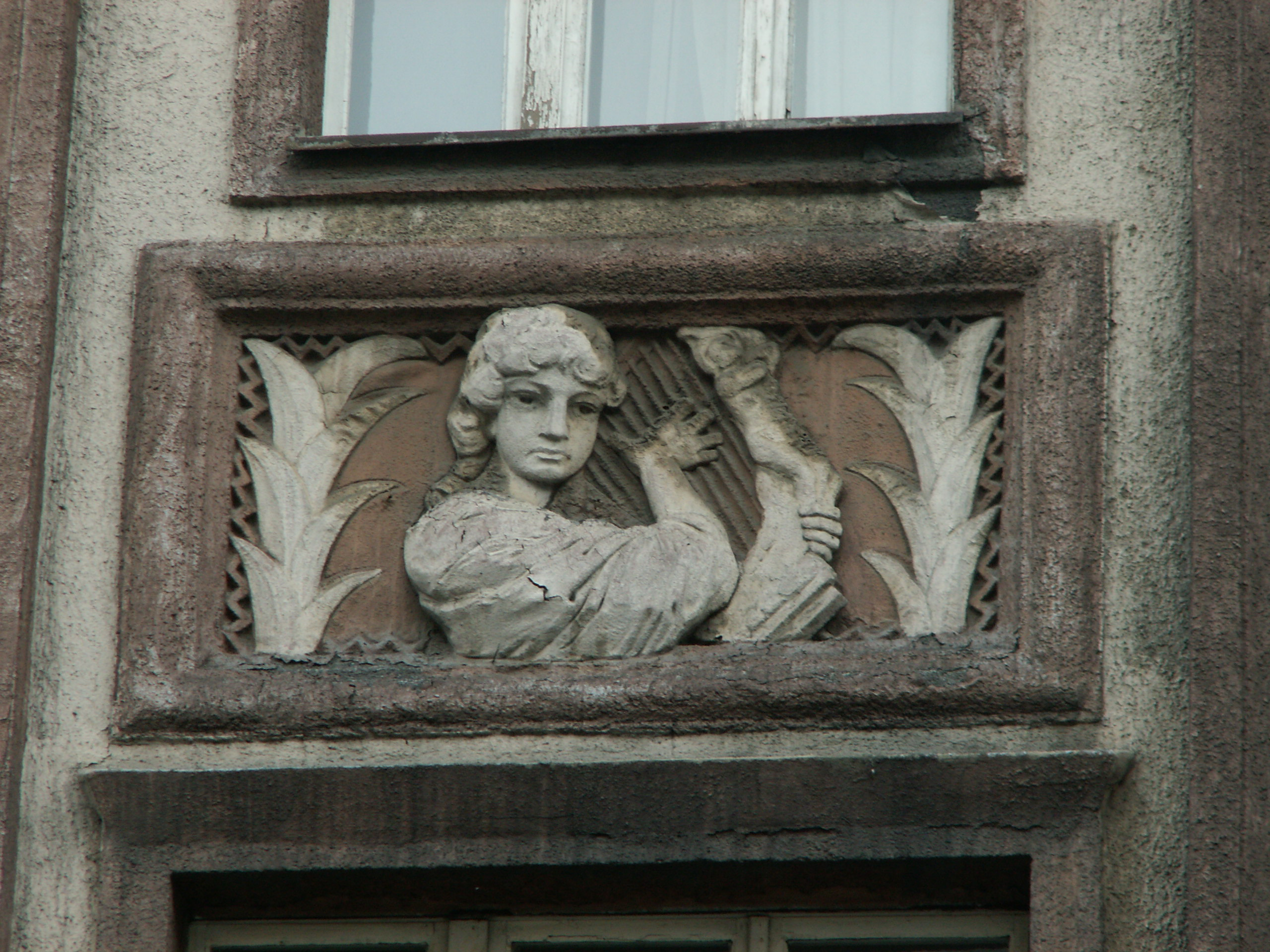 Fragment elewacji budynku Cieplika